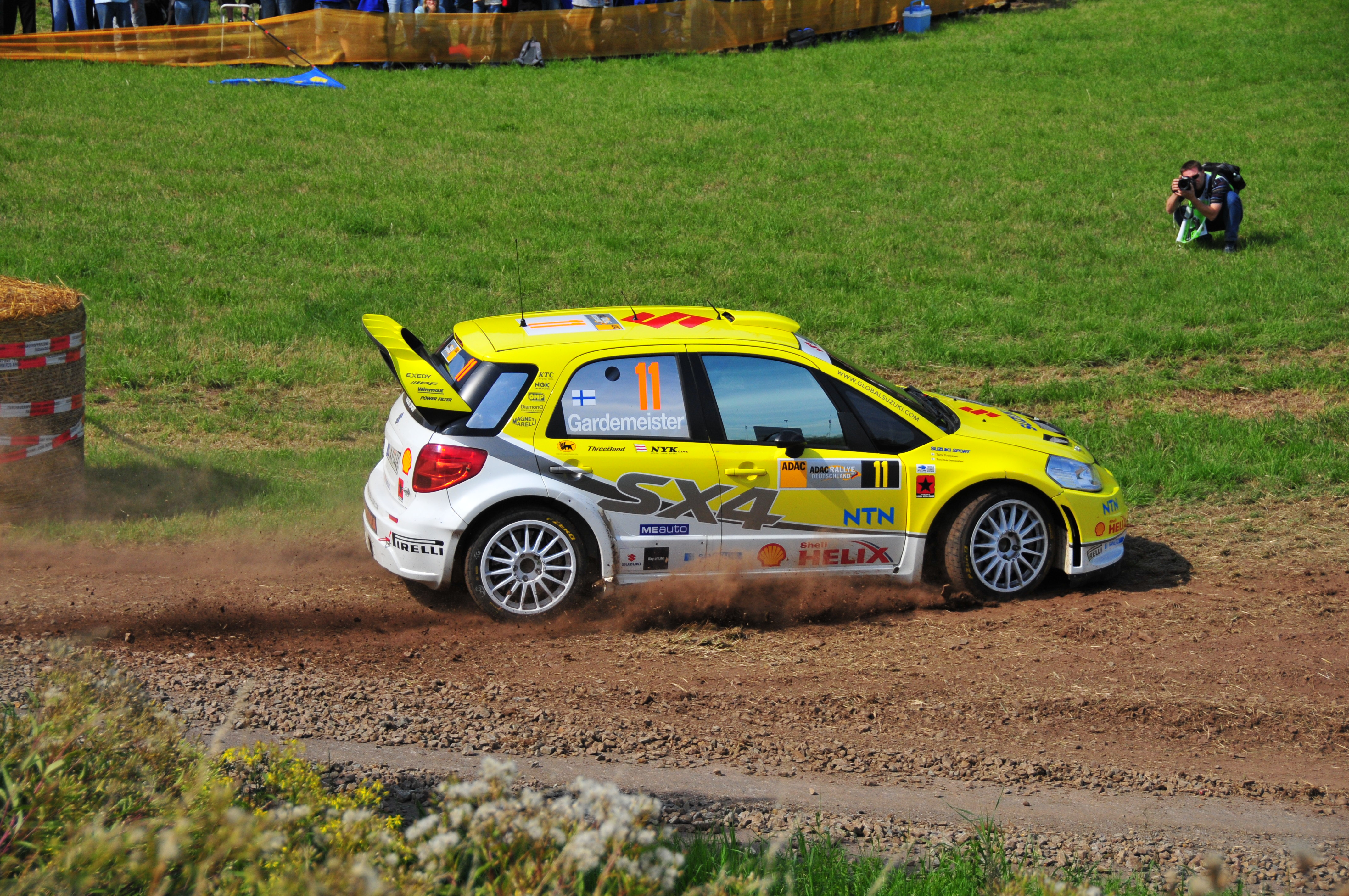 Toni Gardemeister driving his Suzuki SX4 WRC at the 2008 Rallye Deutschland.